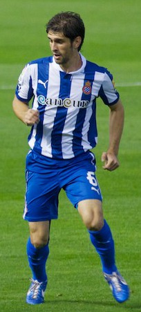 Juan Forliín, jugador perico, a un partit contra el València a Mestalla.